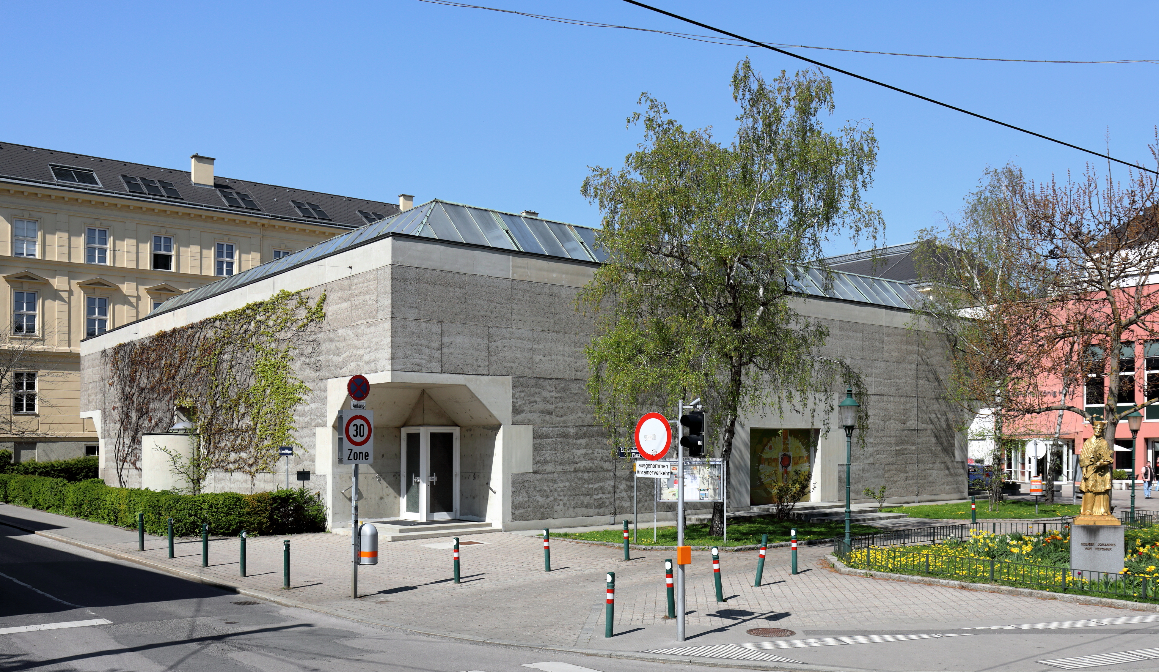 Die Konzilsgedächtniskirche am Kardinal-König-Platz in Lainz, ein Bezirksteil des 13. Wiener Gemeindebezirkes Hietzing.Die Pfarr- und Ordenskirche hl. Ignatius von Loyola wurde ab 1967 nach Plänen von Josef Lackner errichtet und am 22. Juni 1968 geweiht. Bei dem Sichtbetonbau auf quadratischem Grundriss mit flachem Dachaufsatz verzichtete man auf einen Turm.